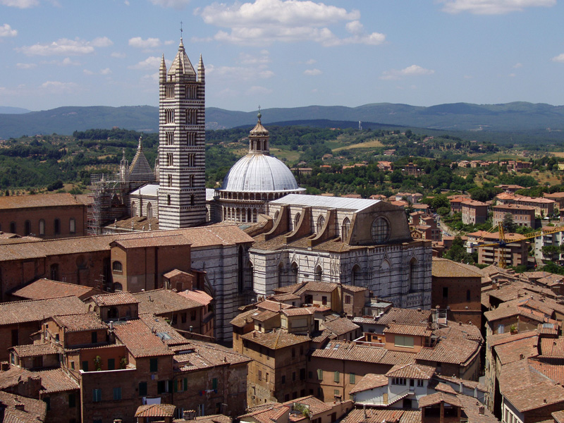 Dom von Siena vom Torre del Mangia, Toscana, Italia